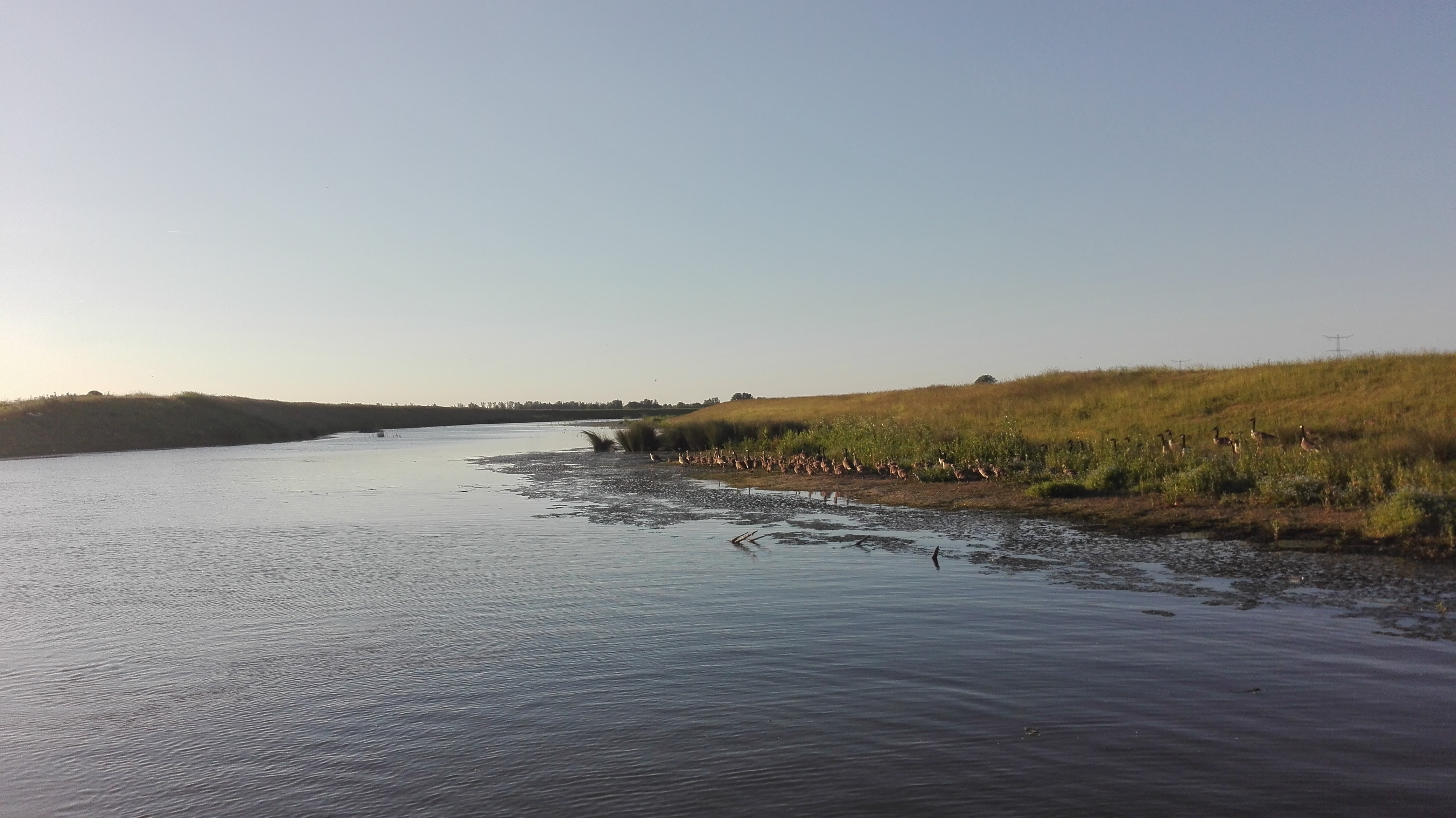 biesbosch